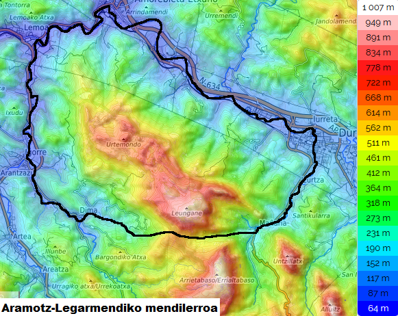 Aramotz-Legarmendiko mendilerroaren mapa topografikoa.